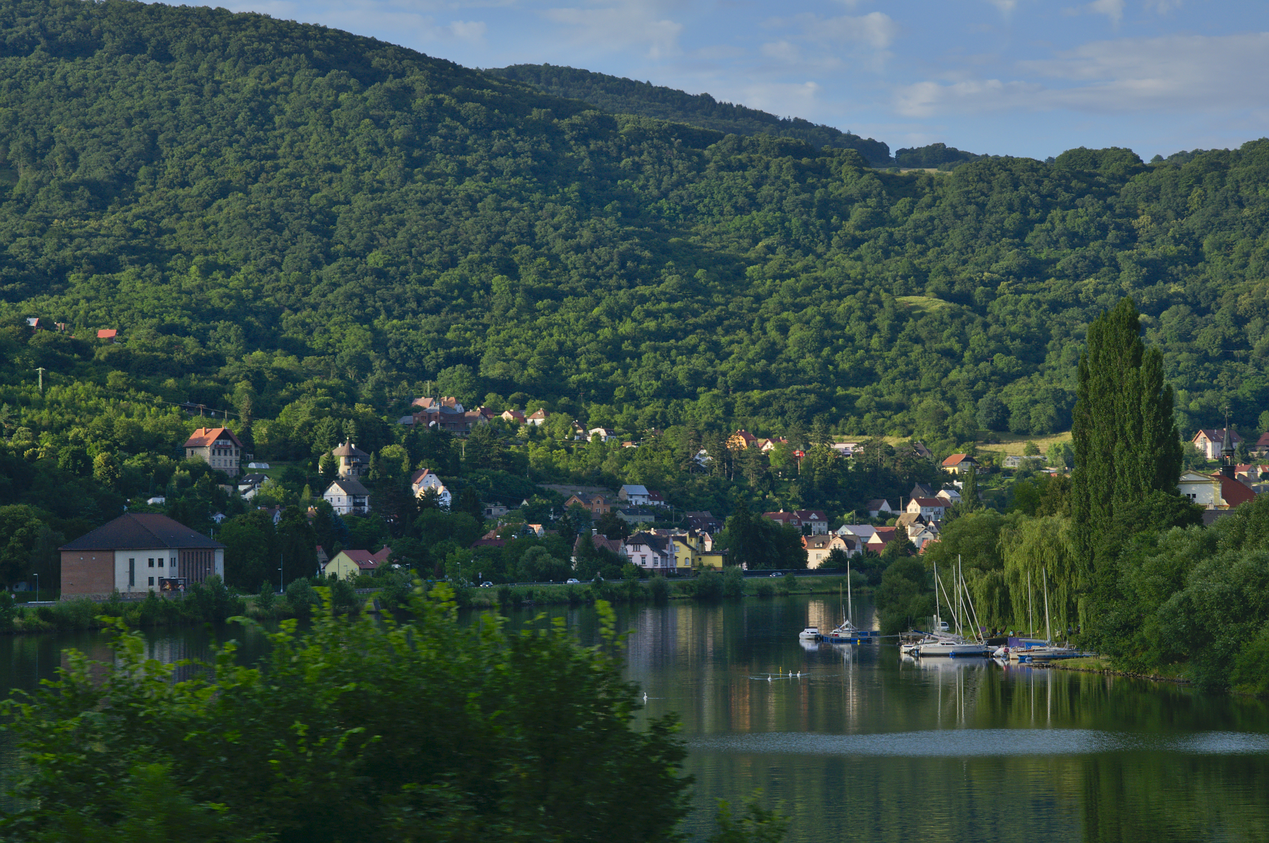 Církvice, část města Ústí nad Labem